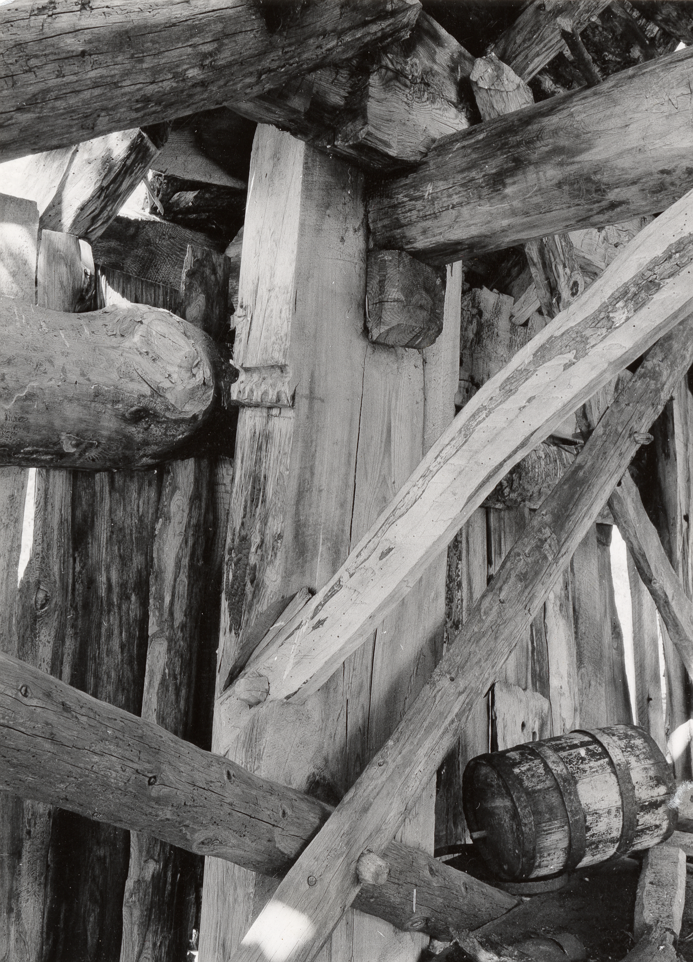 Ørskog kirke i Ørskog, Møre og Romsdal Rester av stolper fra Ørskog stavkirke brukt til bygging av naust. Stavkirkedelene befinner seg i dag på Sunnmøre museum.